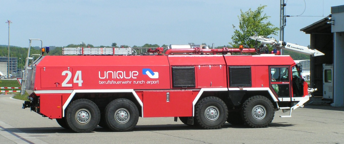 Löschfahrzeug der Zürcher Flughafenfeuerwehr